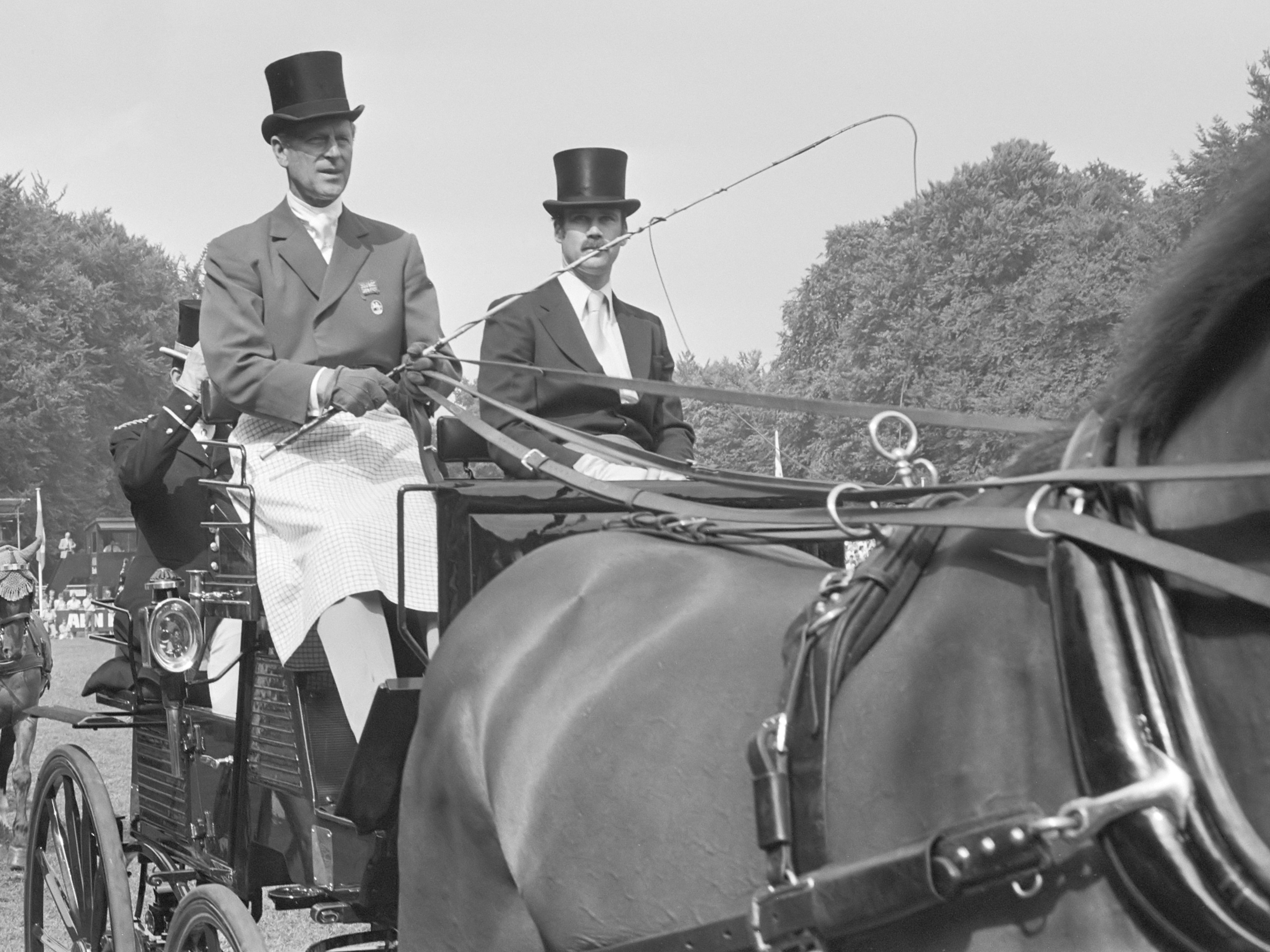 Opening wereldkampioenschappen vierspannen op Het Loo ; Prins Phillip (Engeland) in aktie met vierspan 11 augustus 1982